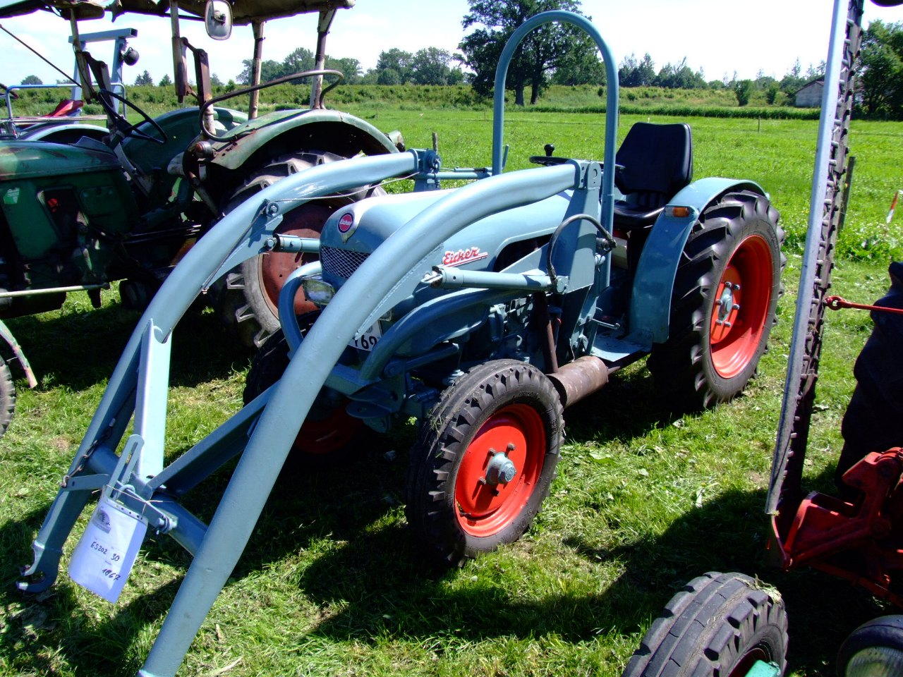 Eicher ES202 mit 30 PS, Baujahr 1967